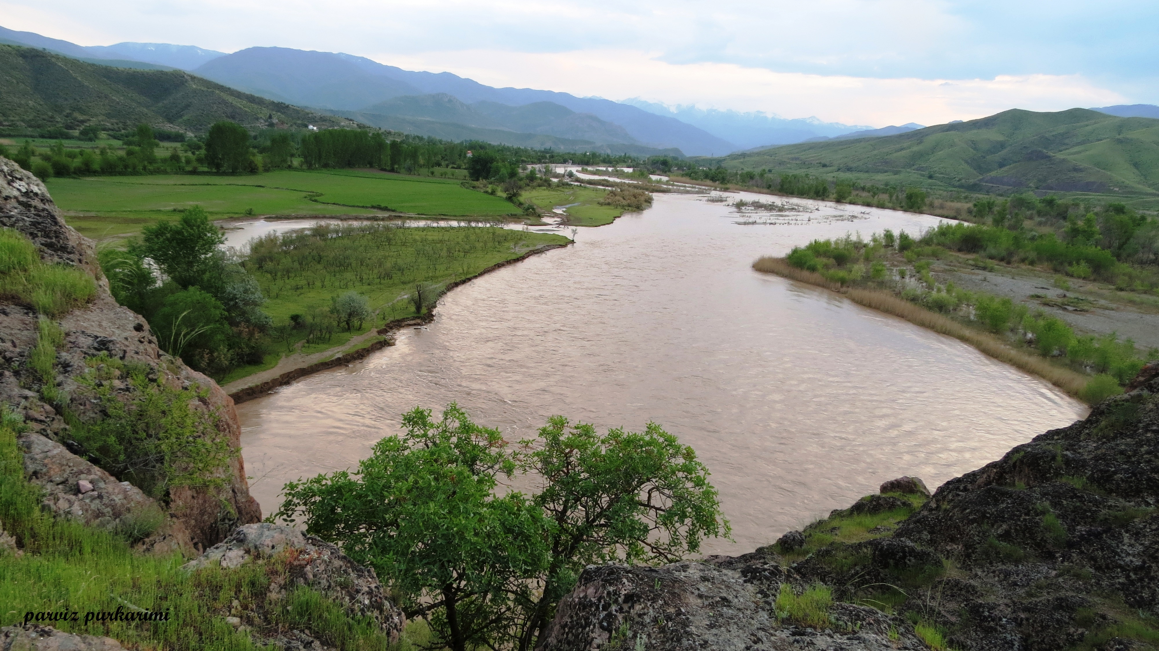 چشم انداز رود ارس از بالای قلعه تاریخی در اراضی پایین دست شهر عاشقلو